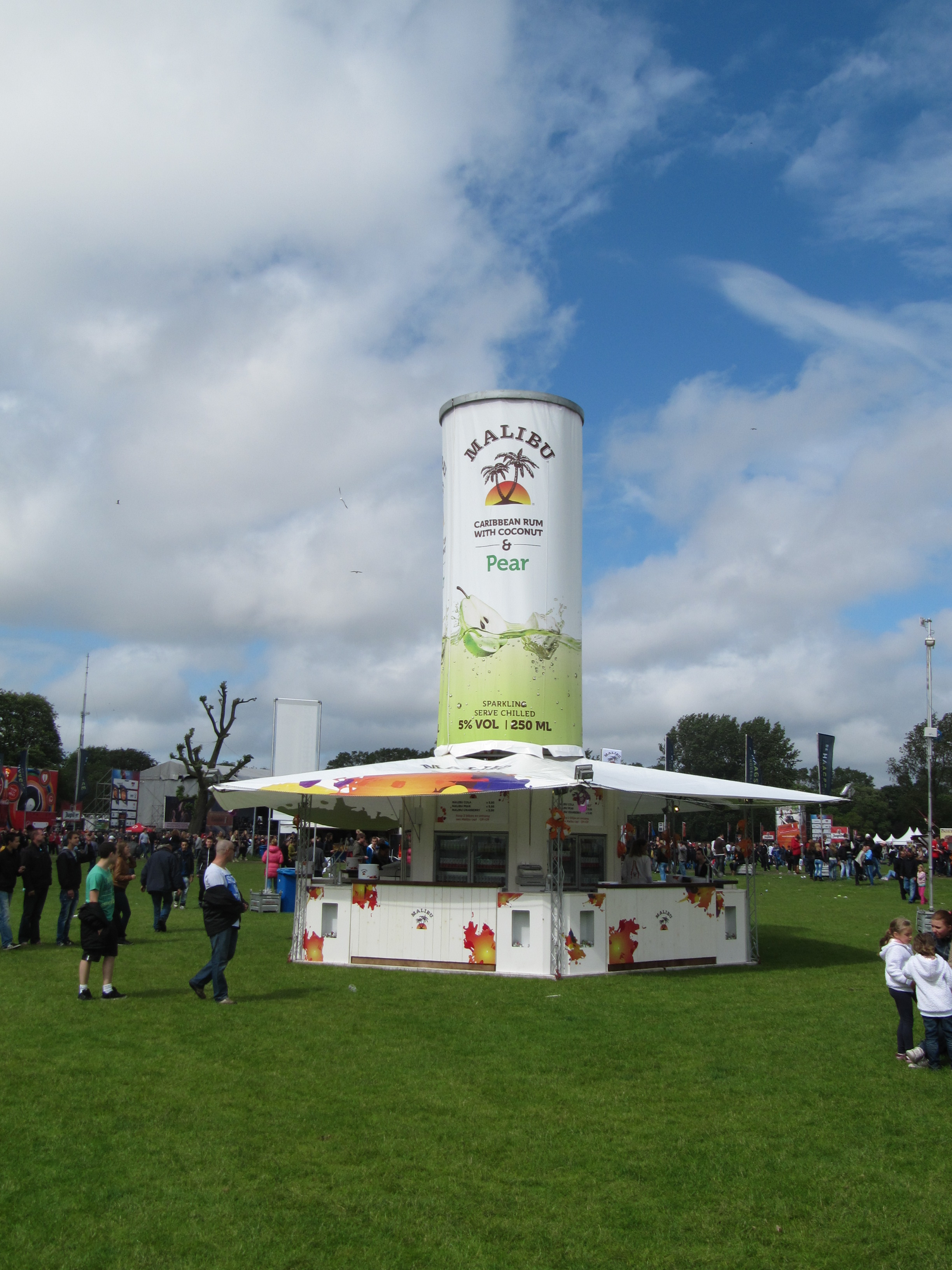 Malibu tent, Parkpop 2012